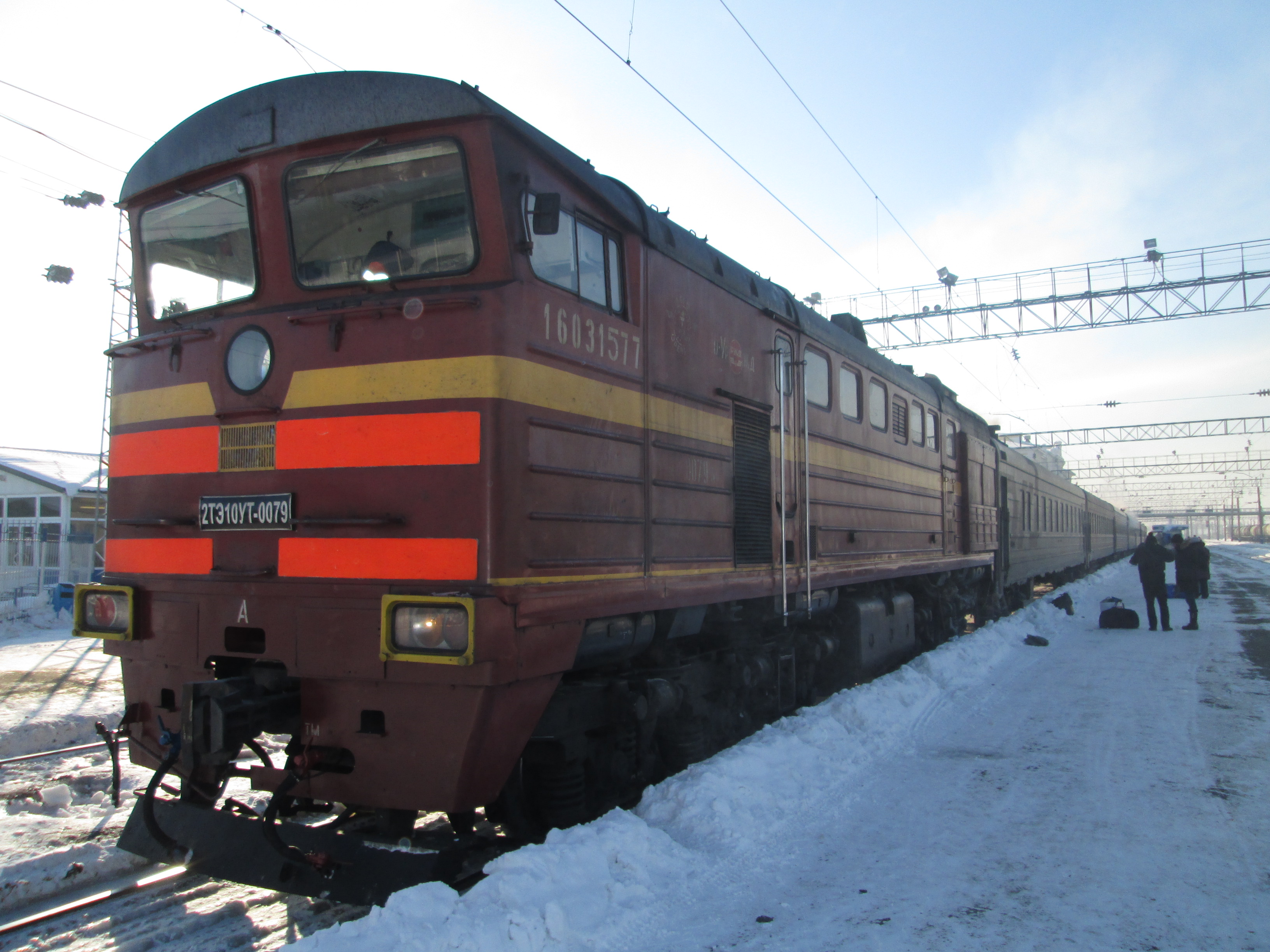 Тепловоз 2ТЭ10УТ-0074 в односекционном варианте с пассажирским поездом, станция Оренбург